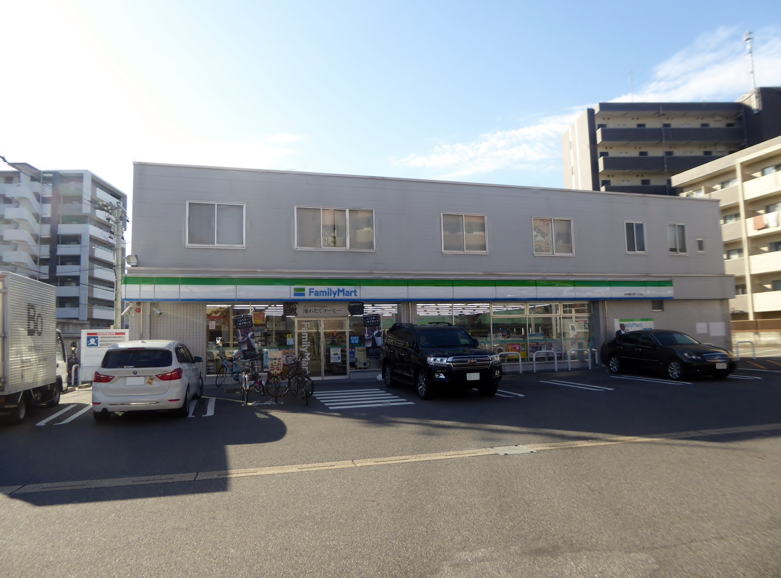 ファミリーマート昭和塩付通一丁目店を撮影。旧サークルKからの転換店舗としては愛知県初となっている。